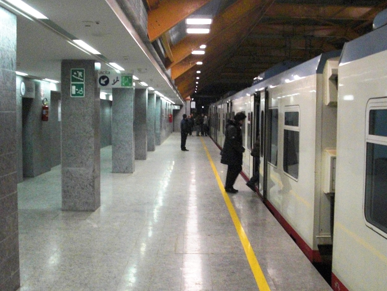 Stazione ferroviaria di San Gabriele, nel quartiere San Paolo della città di Bari. In sosta un treno della ferrovia metropolitana FM1.